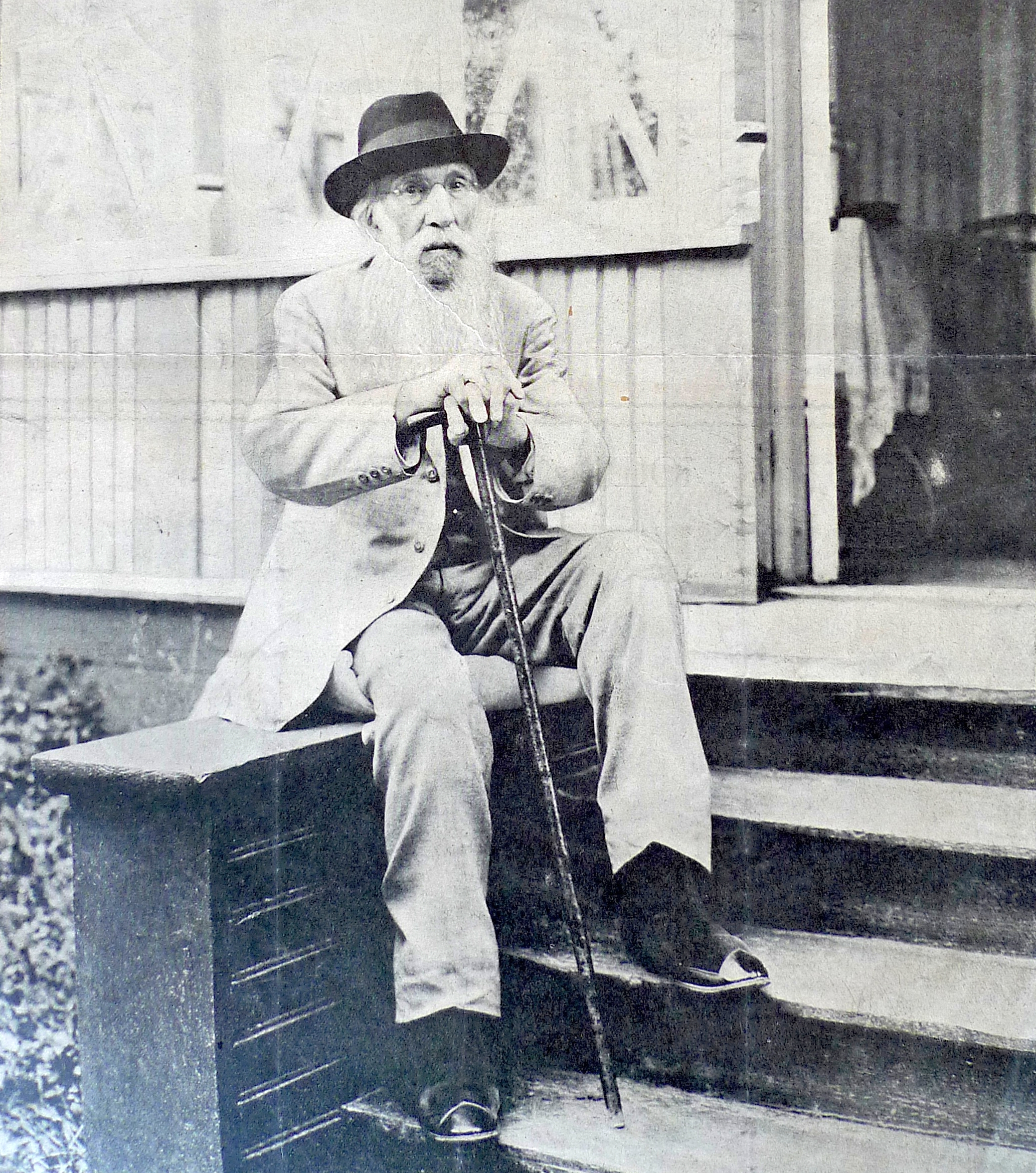 Ламанский, Владимир Иванович